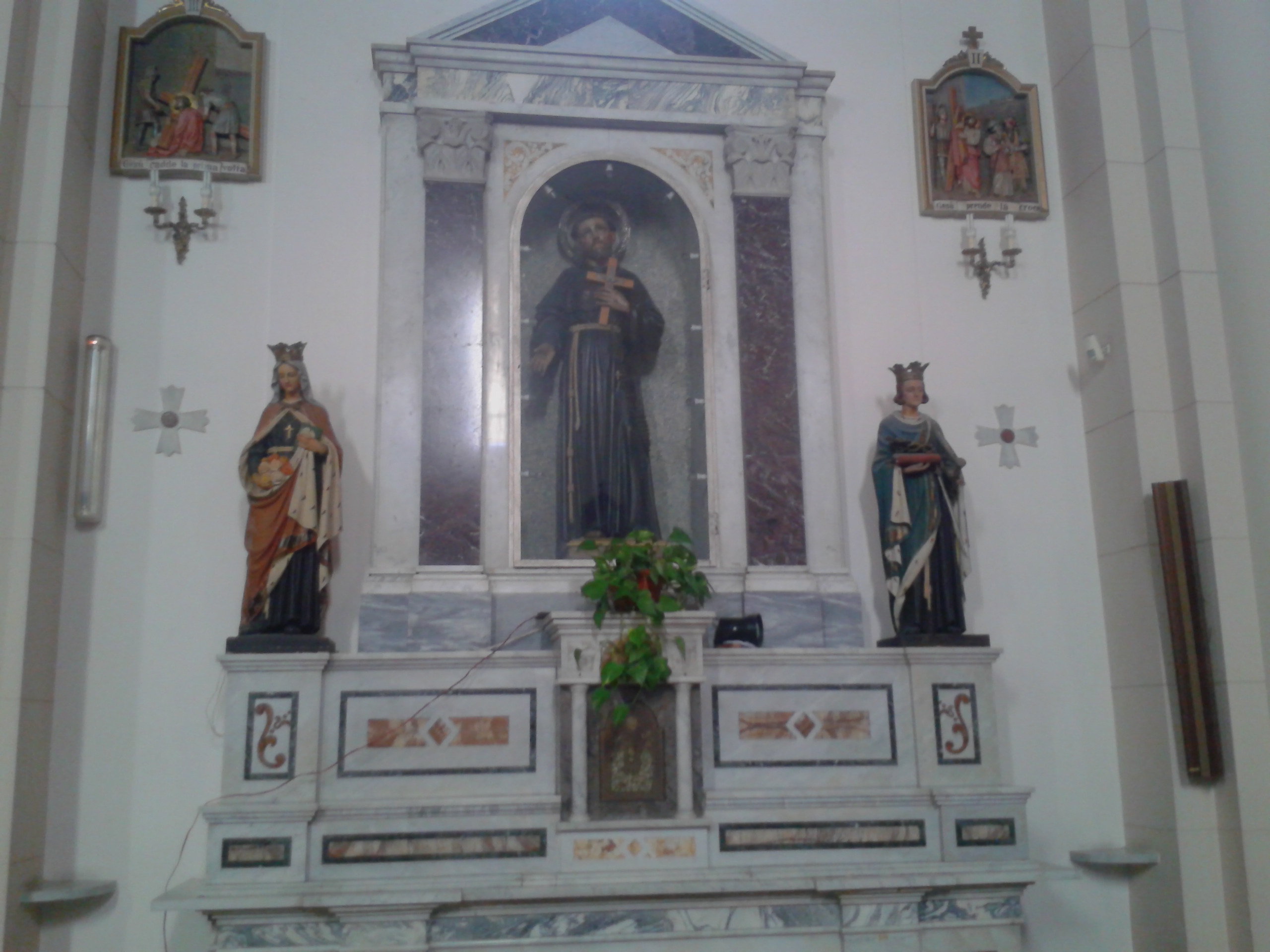 San Francesco d'A. chiesa del Rosario di Palmi